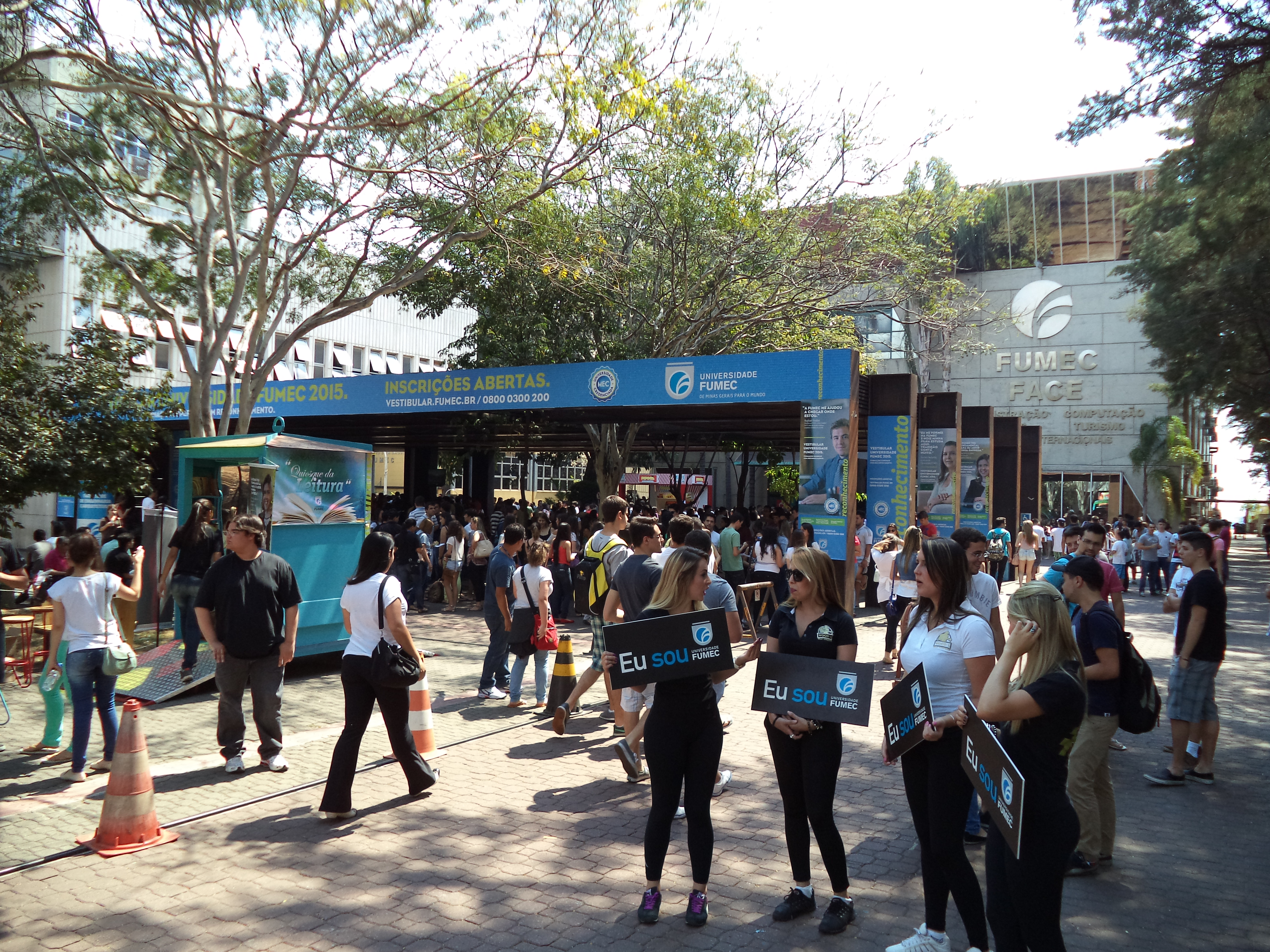 Entrada da Universidade FUMEC campus Cruzeiro, em Belo Horizonte, Brasil.